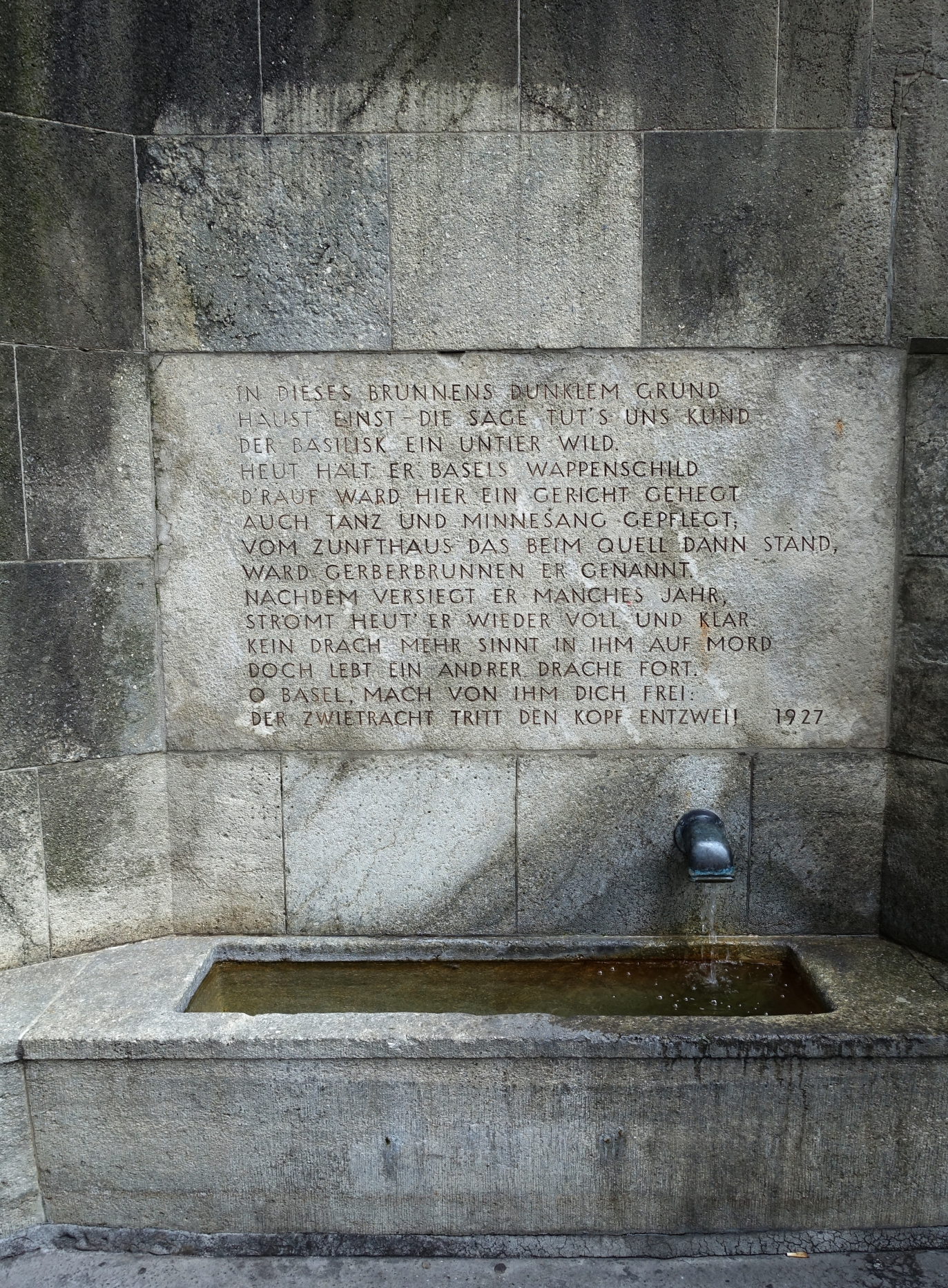 Paul Siegfried (1878–1938) Jurist, Historiker, Schriftsteller. Gerberbrunnen auch Richtbrunnen genannt bei der Gerbergasse 48 in Basel-Stadt. Inschrift: In dieses Brunnens dunklem Grund haust' einst - die Sage tut's und kund - der Basilisk, ein Untier wild. Heut hält er Basels Wappenschild. D'rauf ward hier ein Gericht gehegt, auch Tanz und Minnesang gepflegt; vom Zunfthaus das beim Quell dann stand, ward Gerberbunnen er genannt. Nachdem versiegt er manches Jahr, strömt heut' er wieder voll und klar. Kein Drach' mehr sinnt in ihm auf Mord, doch lebt ein andrer Drache fort, O Basel, mach' dich von ihm frei: der Zwietracht tritt den Kopf entzwei!" Altbasel.ch